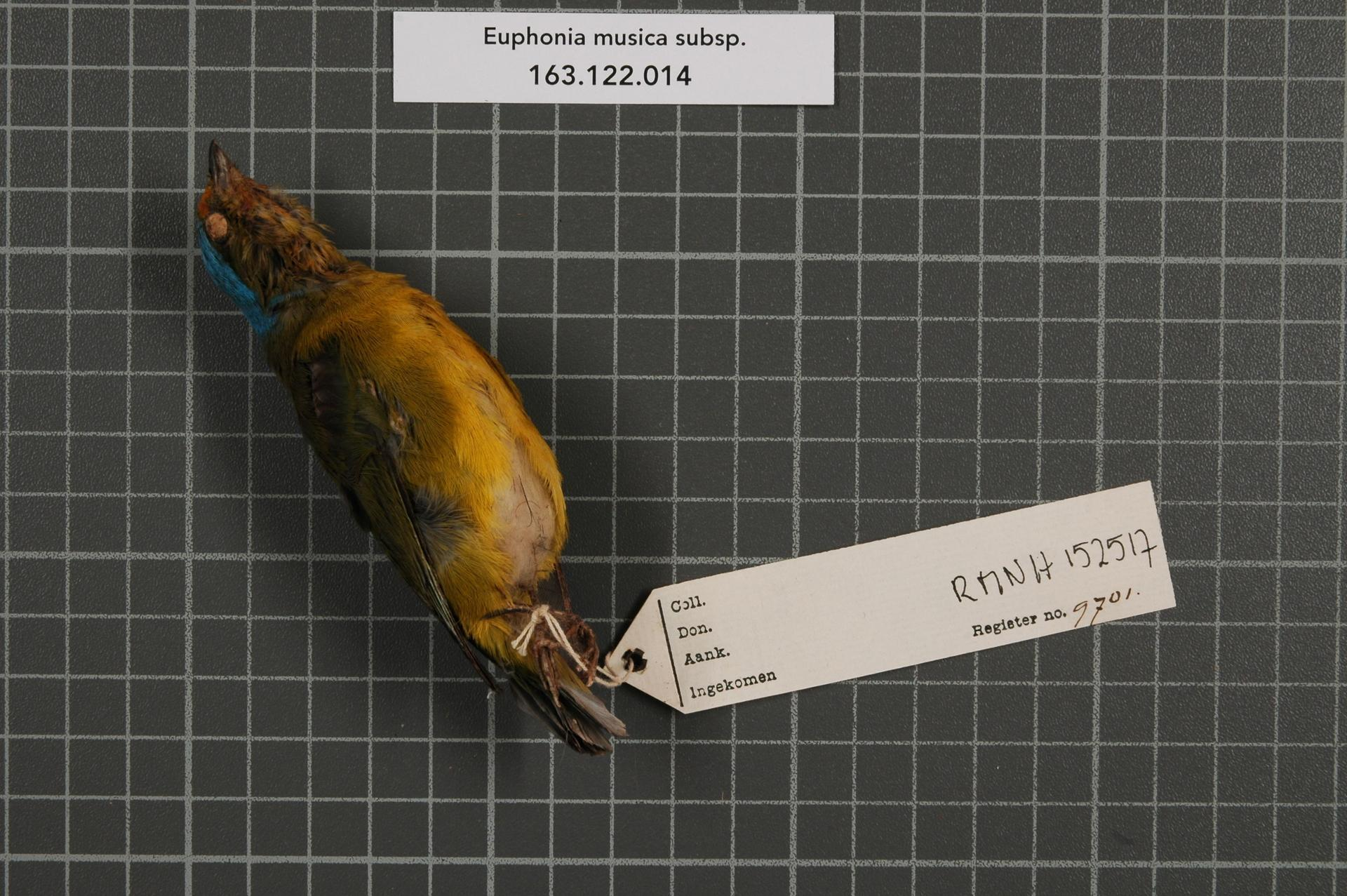 Euphonia musica subsp.